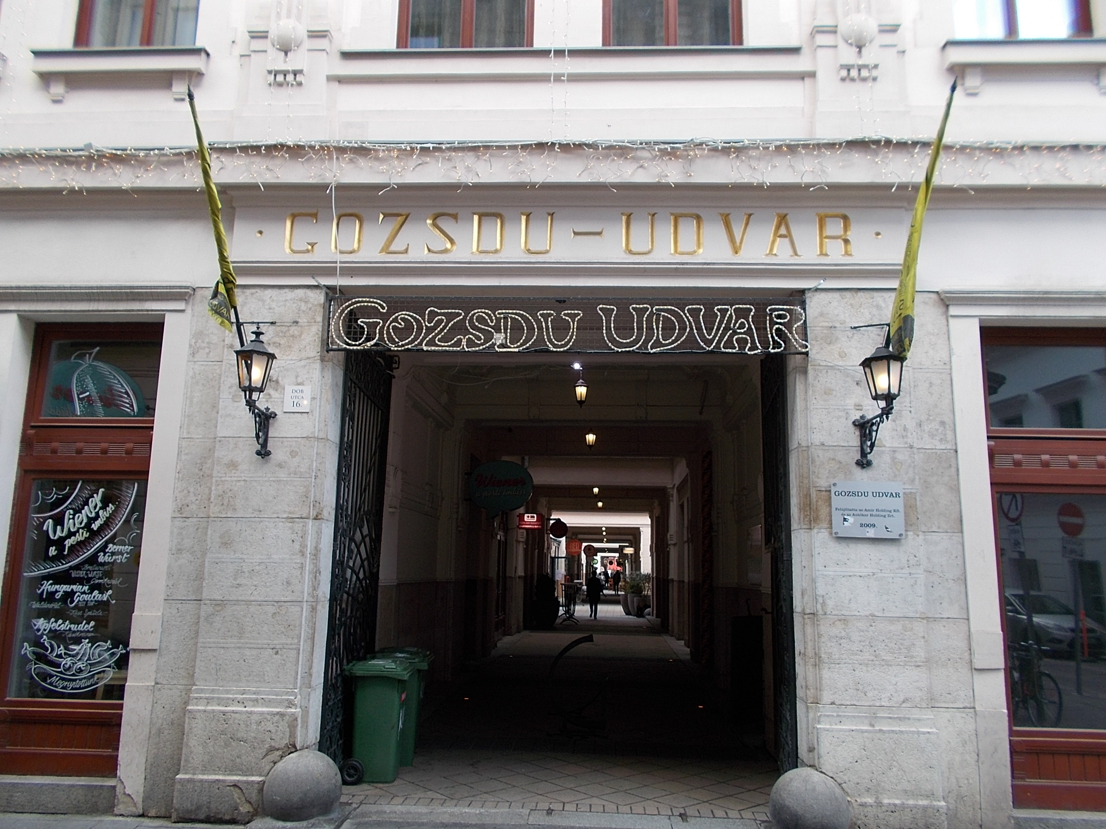 Gozsdu-udvar. Dob utcai bejárat. Műemlék ID 840 - Budapest 7. kerület. Dob utca